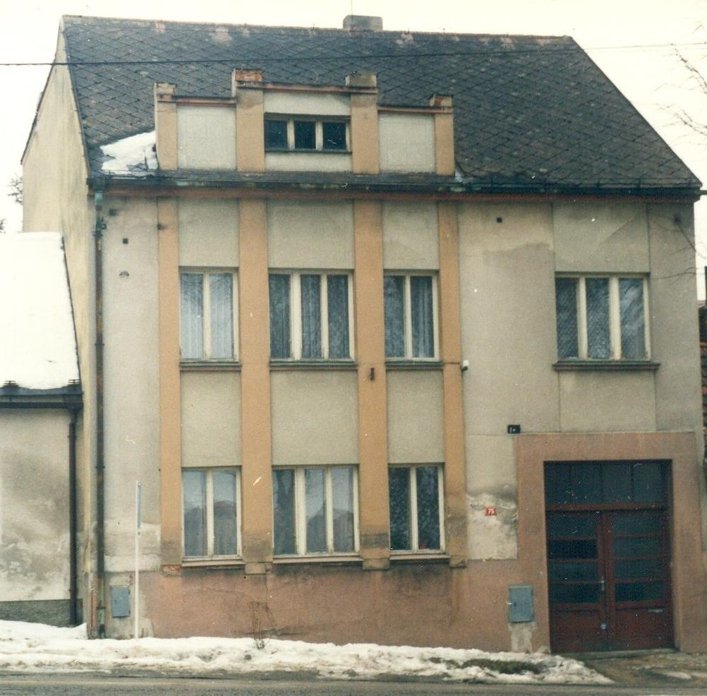 Vila Rudolfa Schönbacha, ve které byla nalezena jedna ze sedmi skrýší koženého zboží, které si tu podnikatel ukryl v době, kdy byl nucen emigrovat do Argentiny.